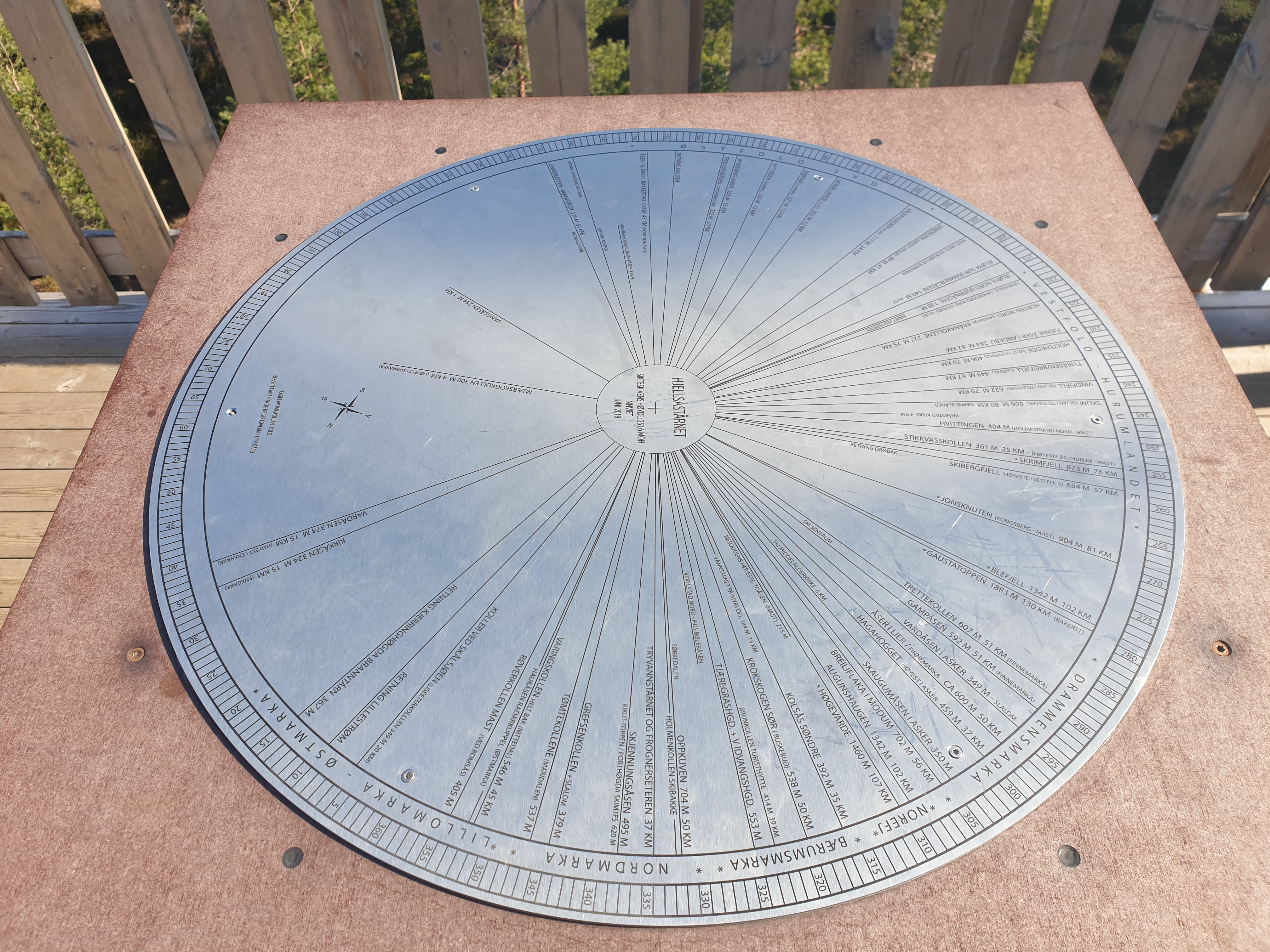 Sikteskive på Hjellsåstårnet